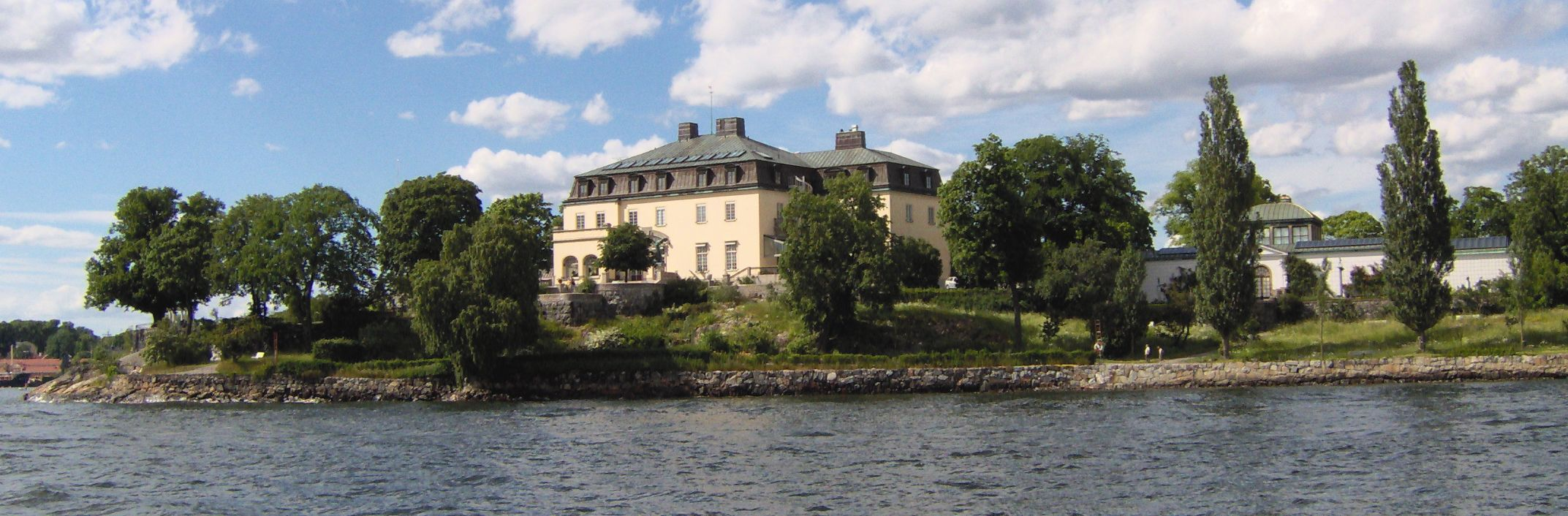 Waldemarsudde, för konstutställningar, på sommaren 2005 i Stockholm. Waldemarsudde, a art gallery, in the summer in Stockholm, Sweden 2005